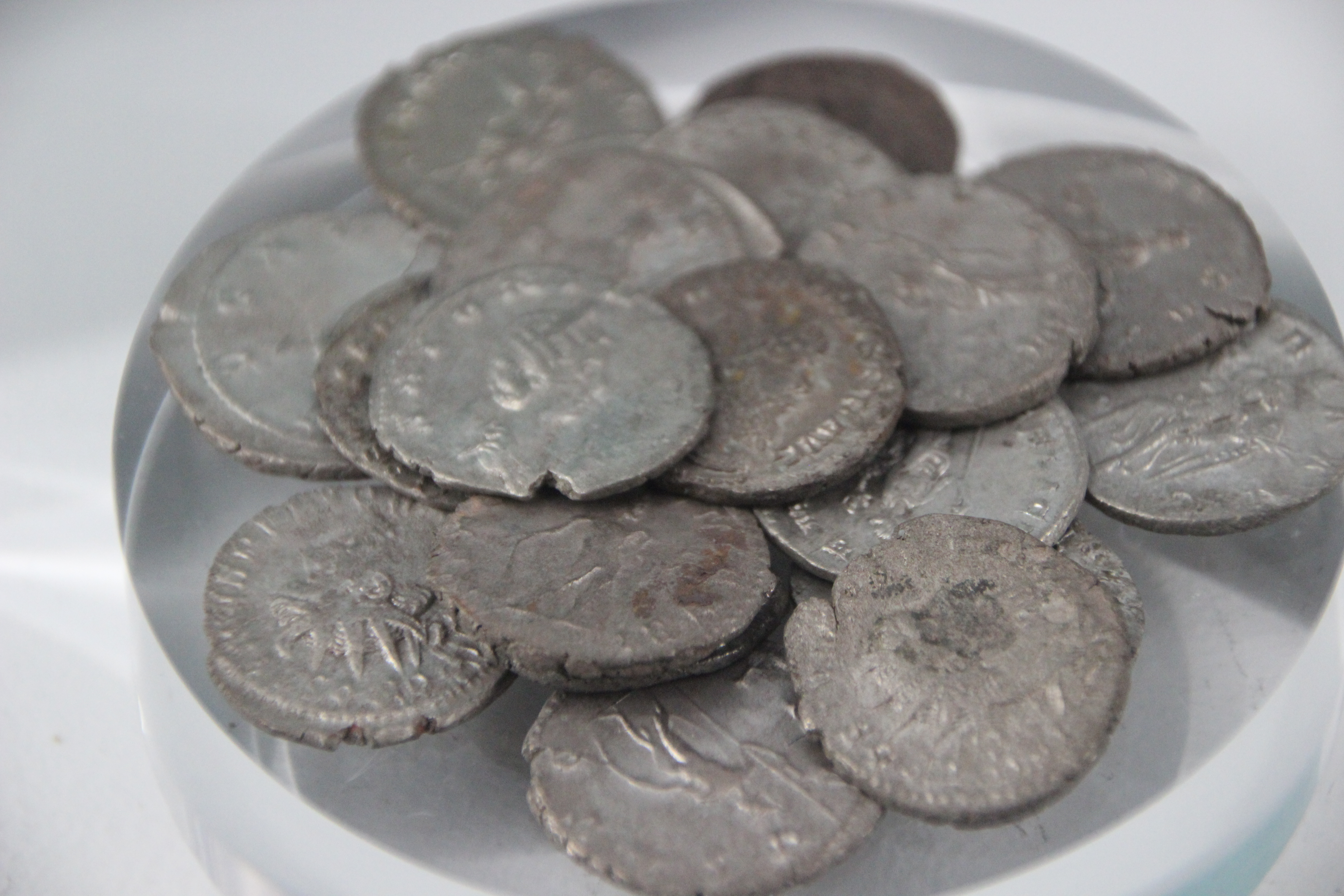 Trésor de Tourouvre 1